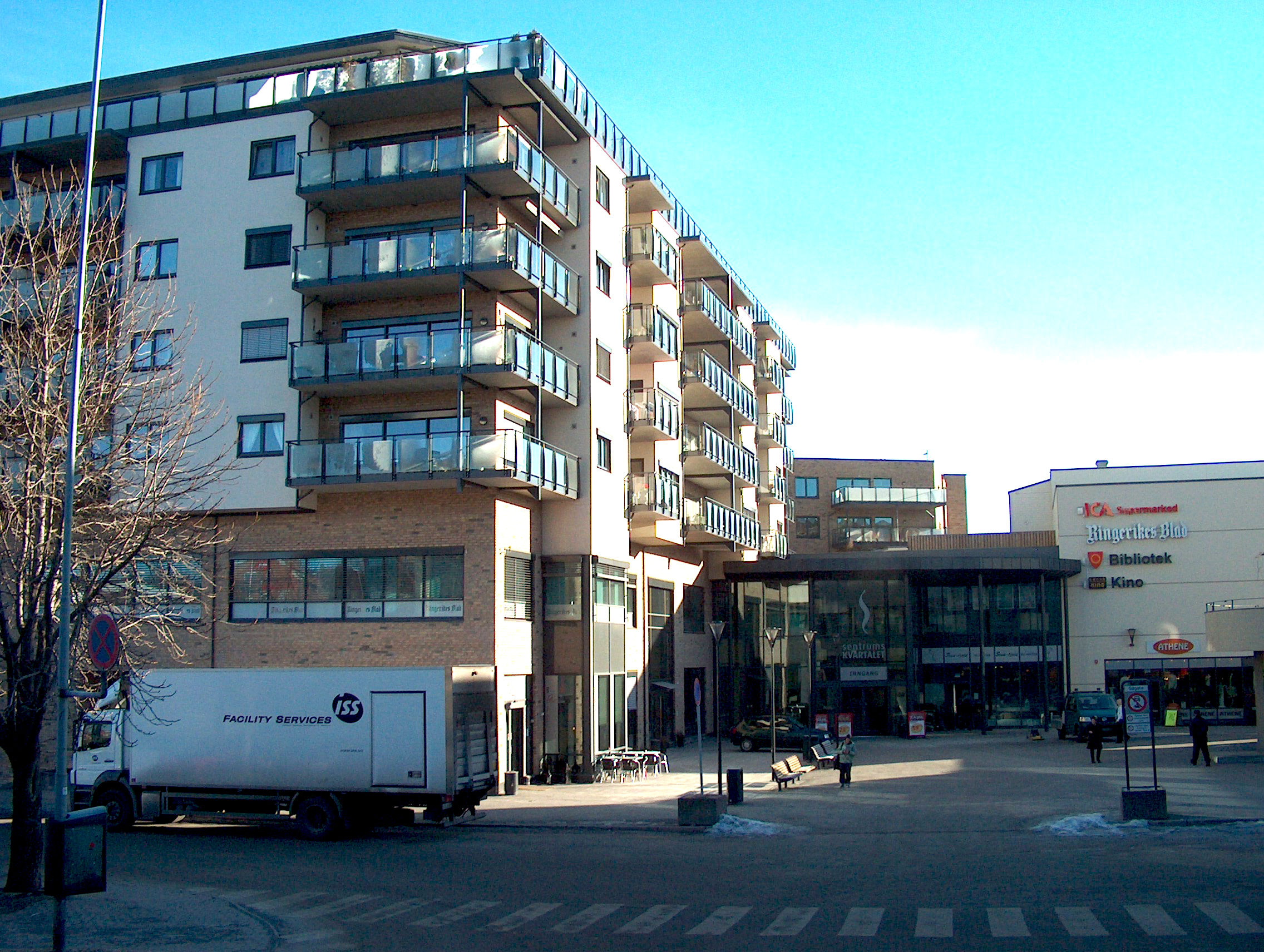 Sentrumskvartalet i Hønefoss (der Rutebilplata lå tidligere)